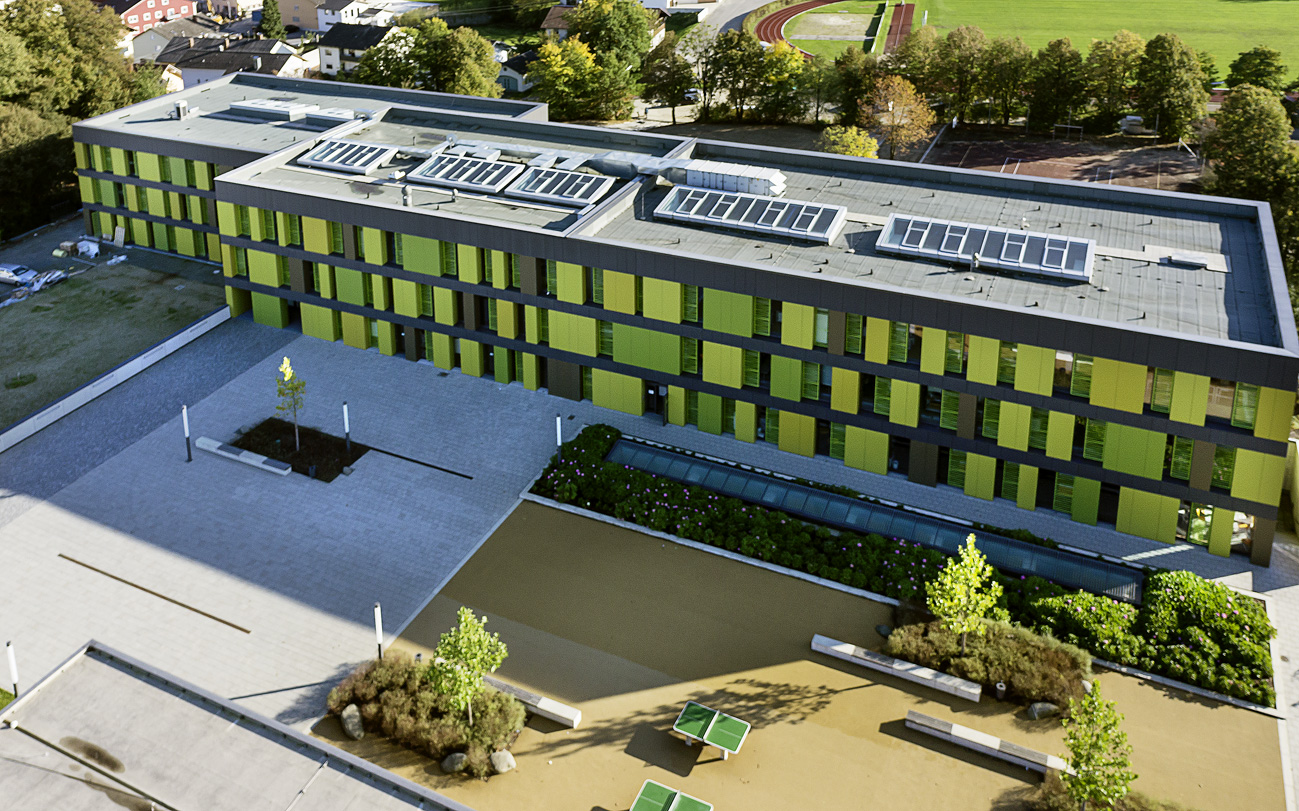 Luftaufnahme der Realschule Schöllnch